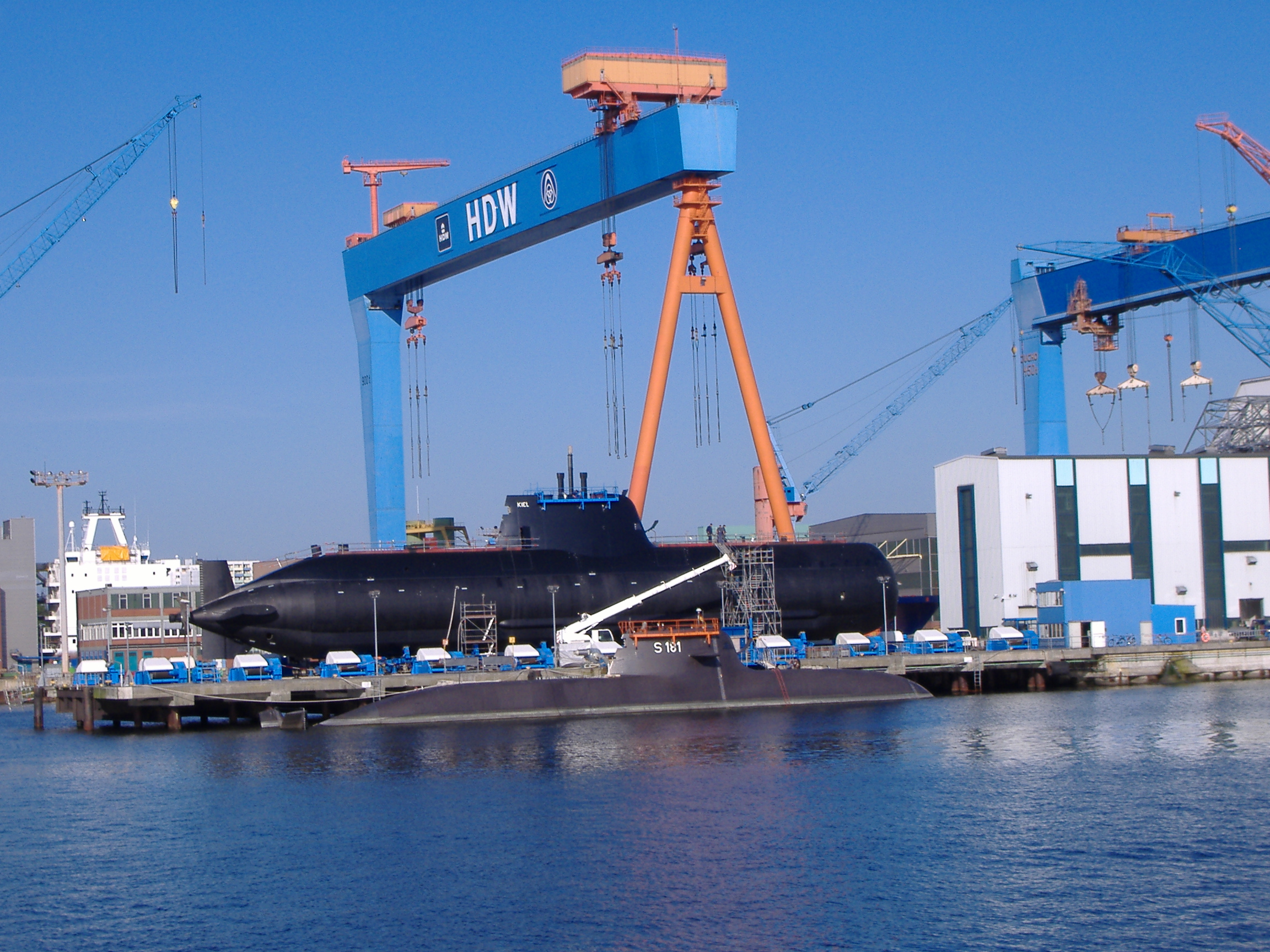 Ein U-Boot in der Howaldtswerke-Deutsche Werft in Kiel.